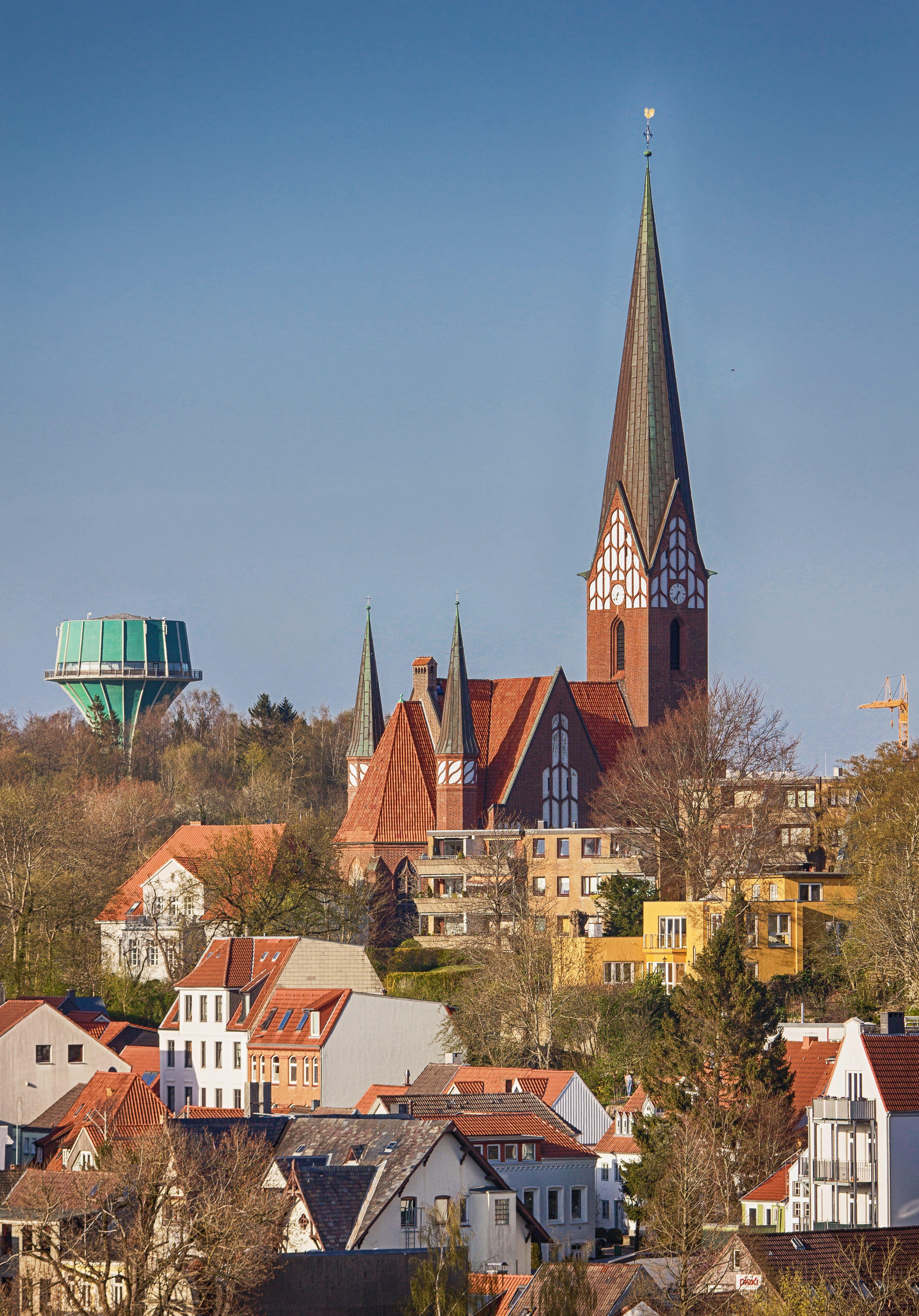 Die St. Jürgen-Kirche und der Wasserturm - Frühjahr 2015 - HDR